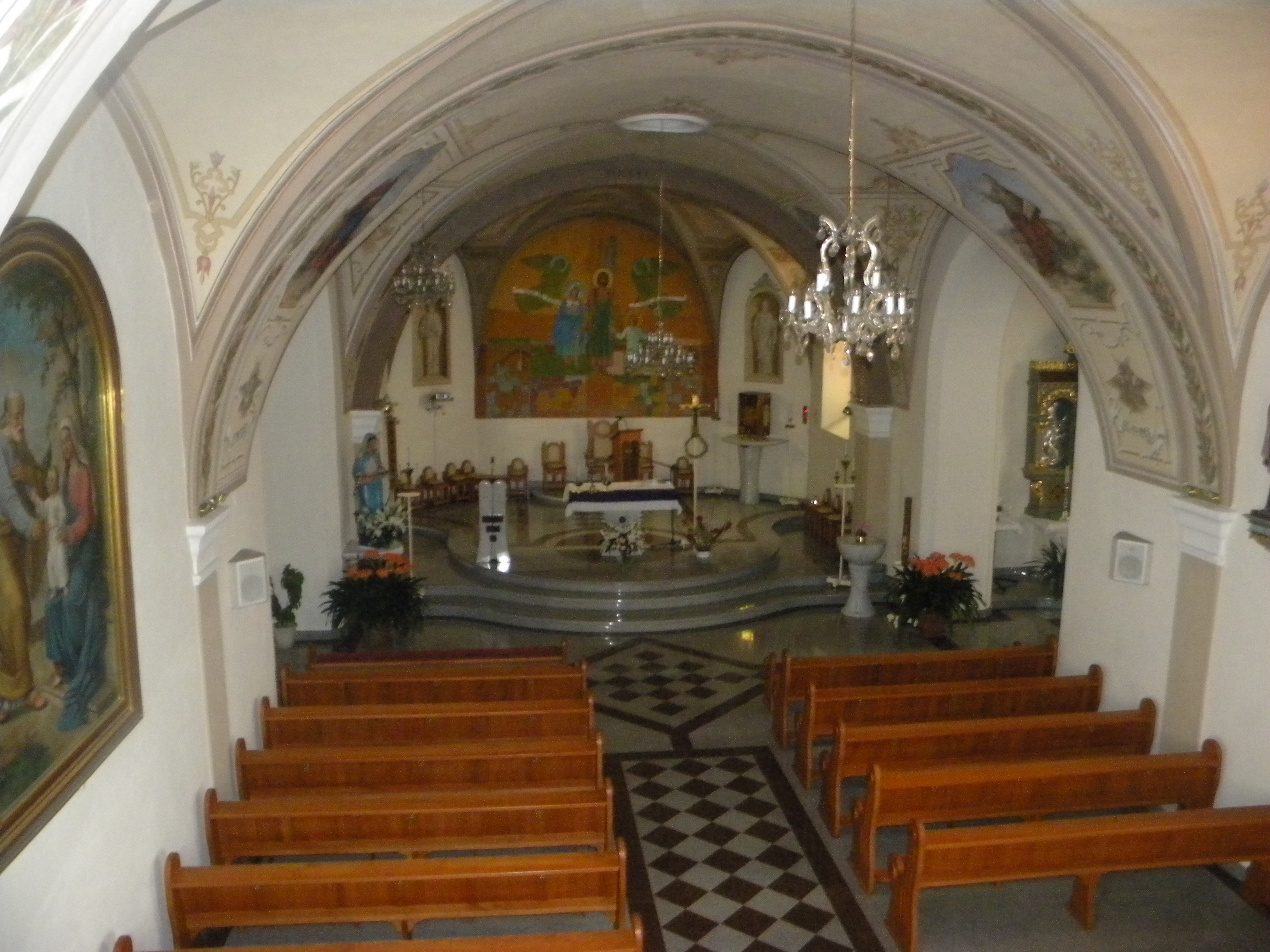 Notranjost cerkve sv jožefa v cankovi